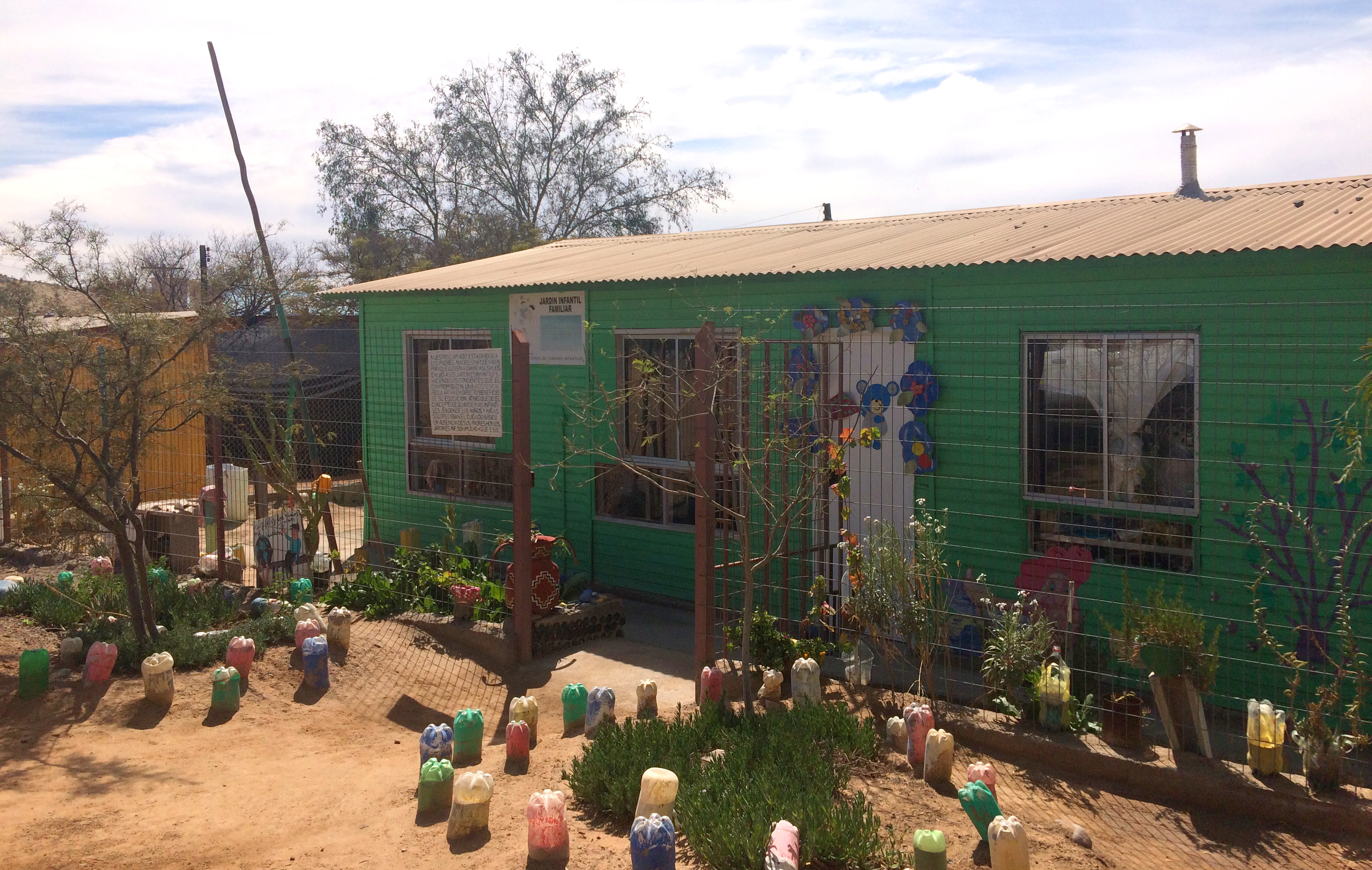 Jardín Infantil en Cachiyuyo, Chile.